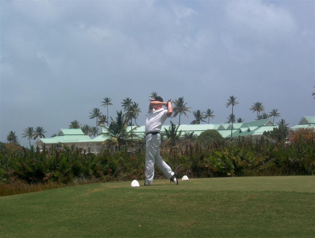 Tobago Plantations